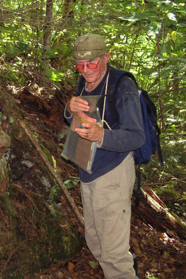 Jehan Rondot, géologue et découvreur de l'Astroblème de Charlevoix. Photographie mise avec la permission de Michel Rondot (fils).